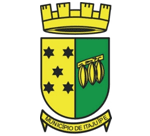 Brasão_Itajuípe_BA.gif